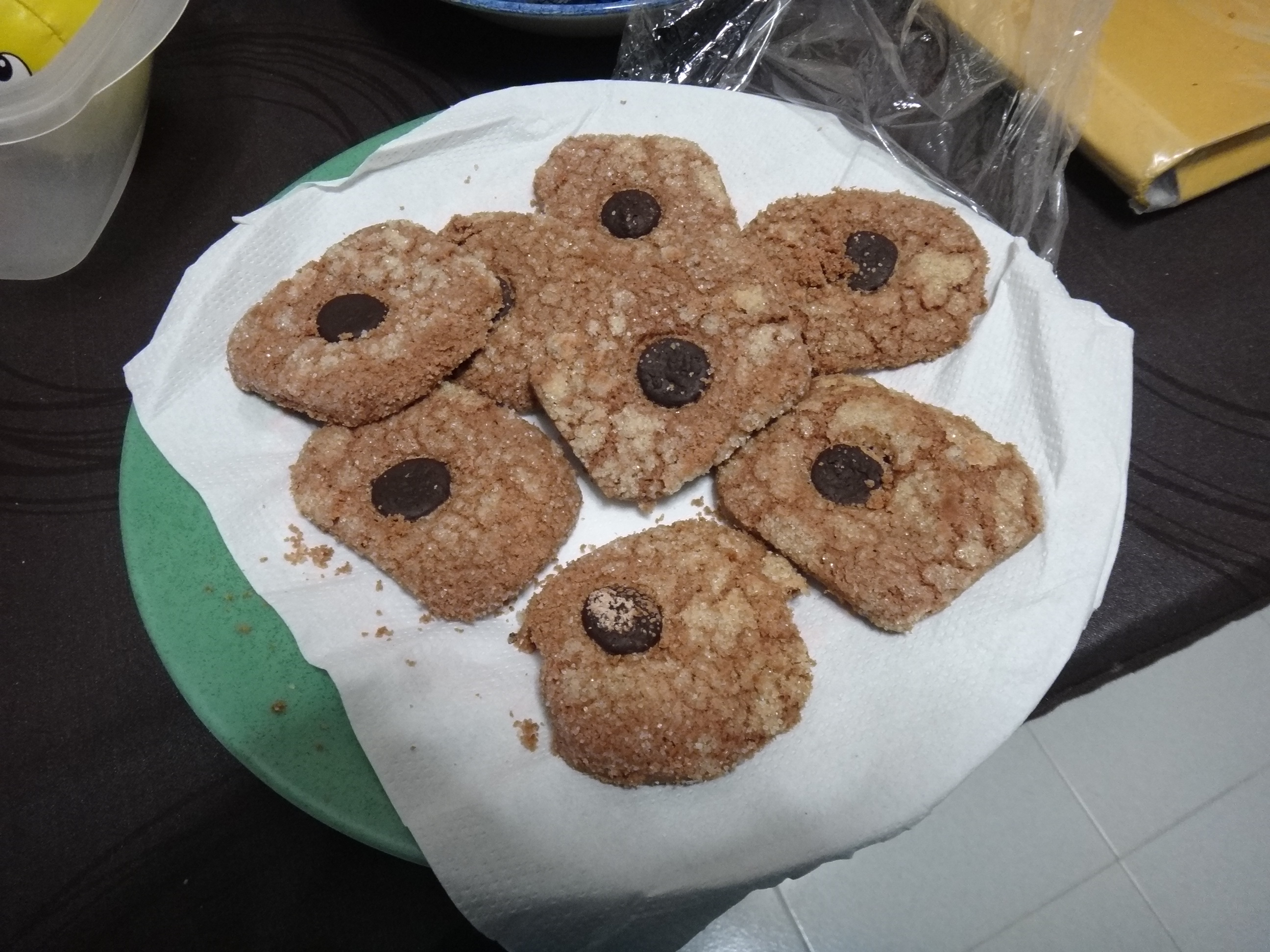 Pastas del Convento del Corpus Christi de las Mercedarias Descalzas de Arcos de la Frontera (Andalucía, España)